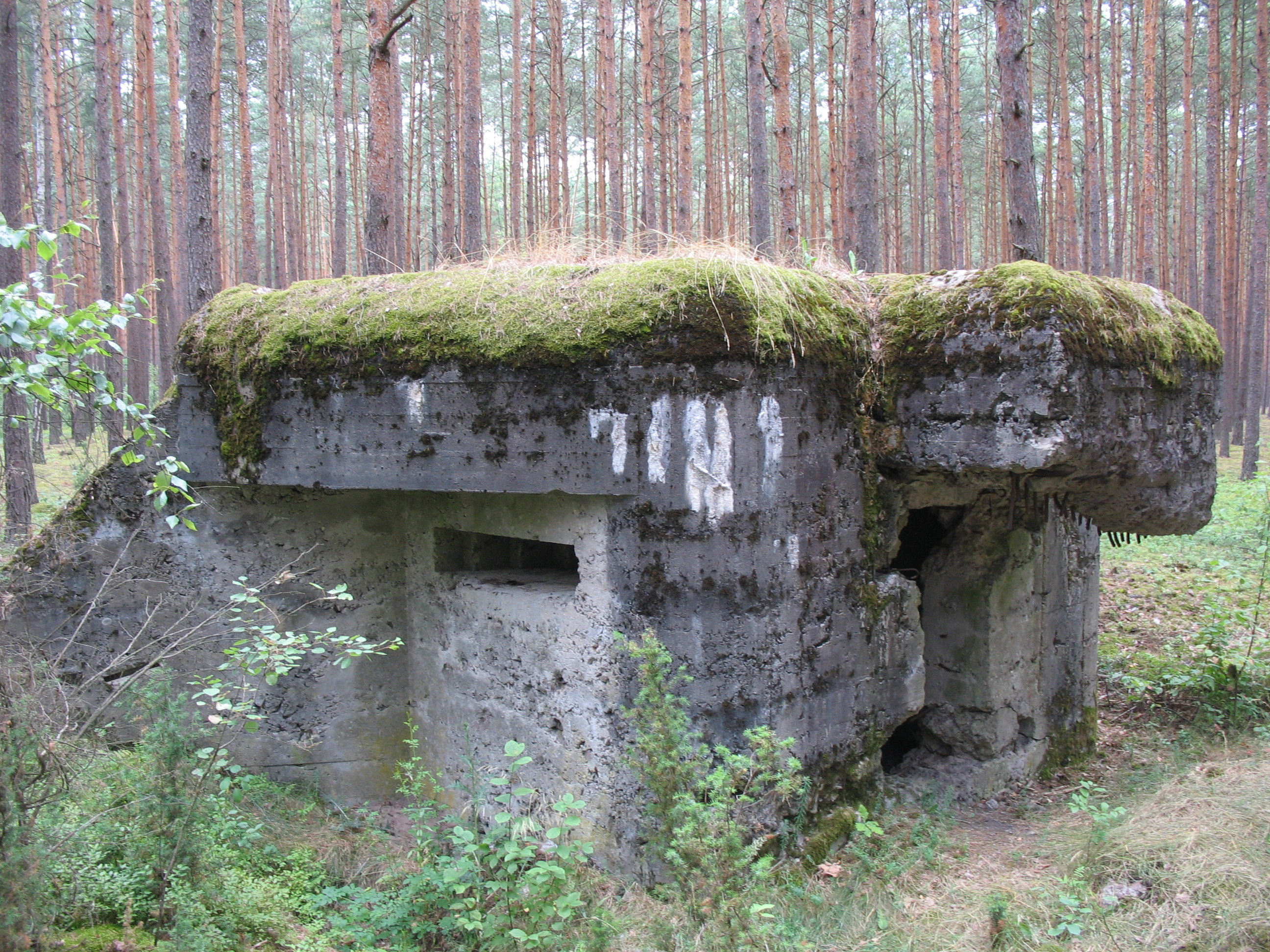 Schrony Armii Łódź - Faustynów